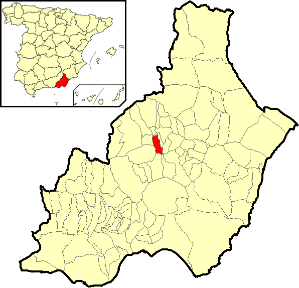 Situación del término municipal de Sierro respecto a la provincia de Almería, en España.